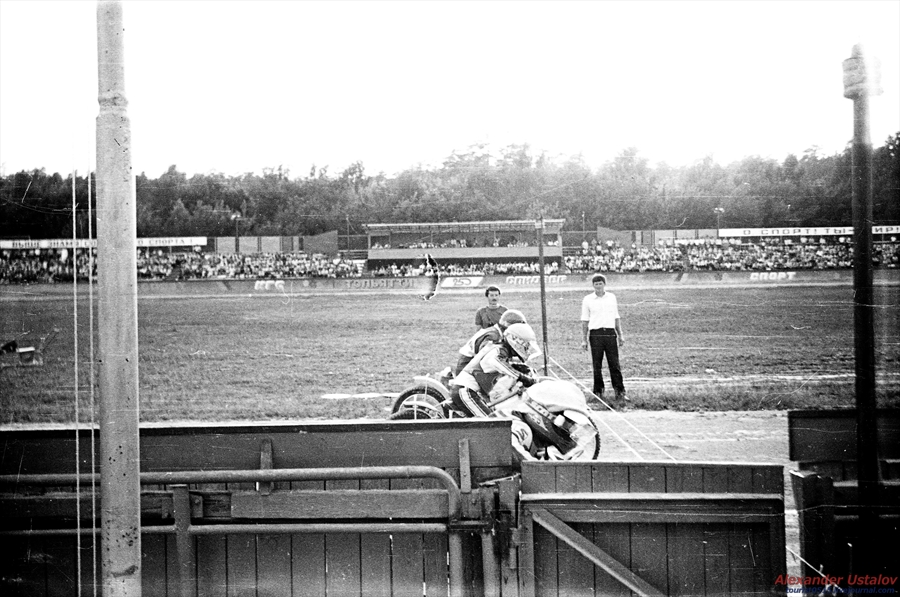 Старт свидвейного заезда. Тольятти, 1986 год.